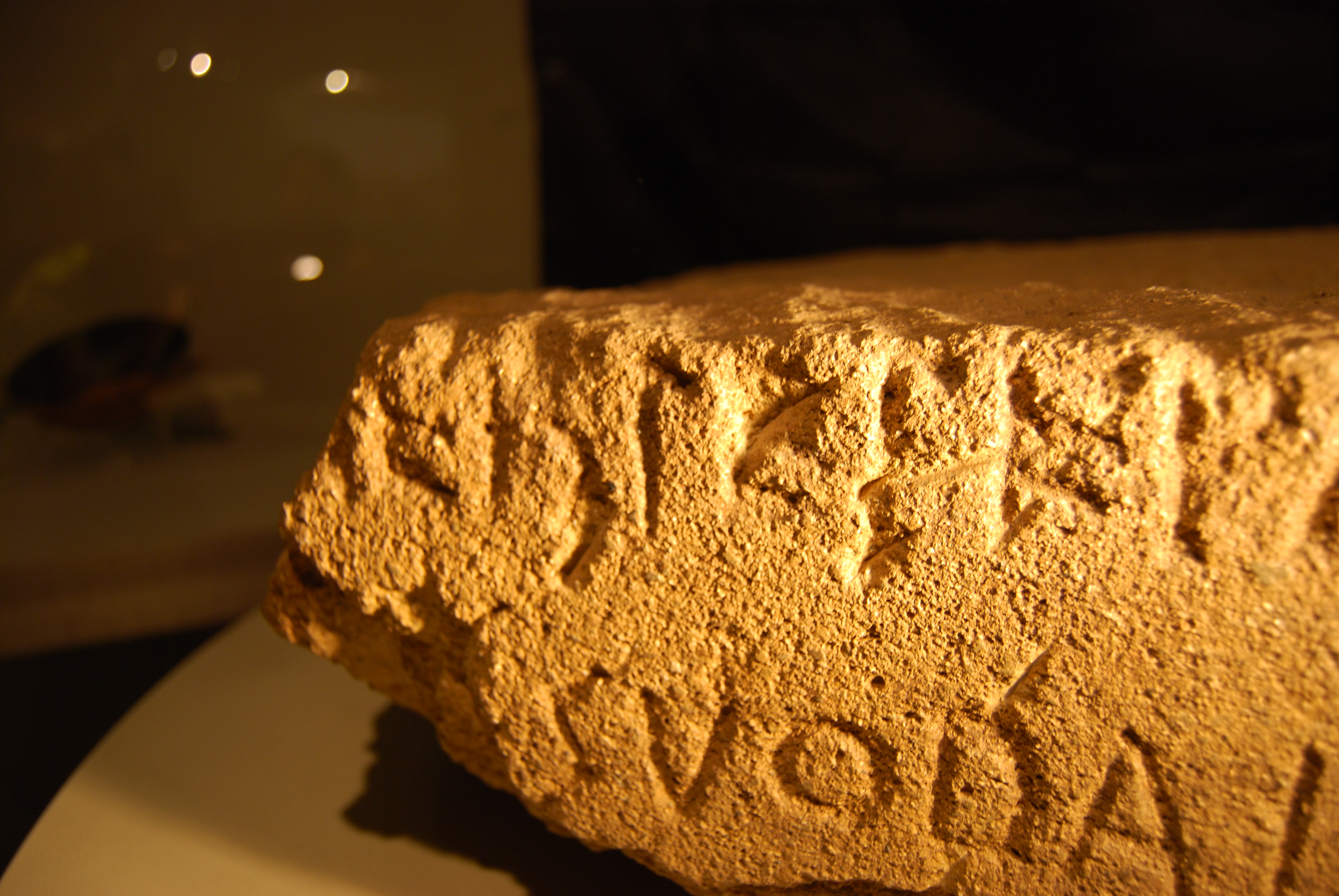 EDR 078476